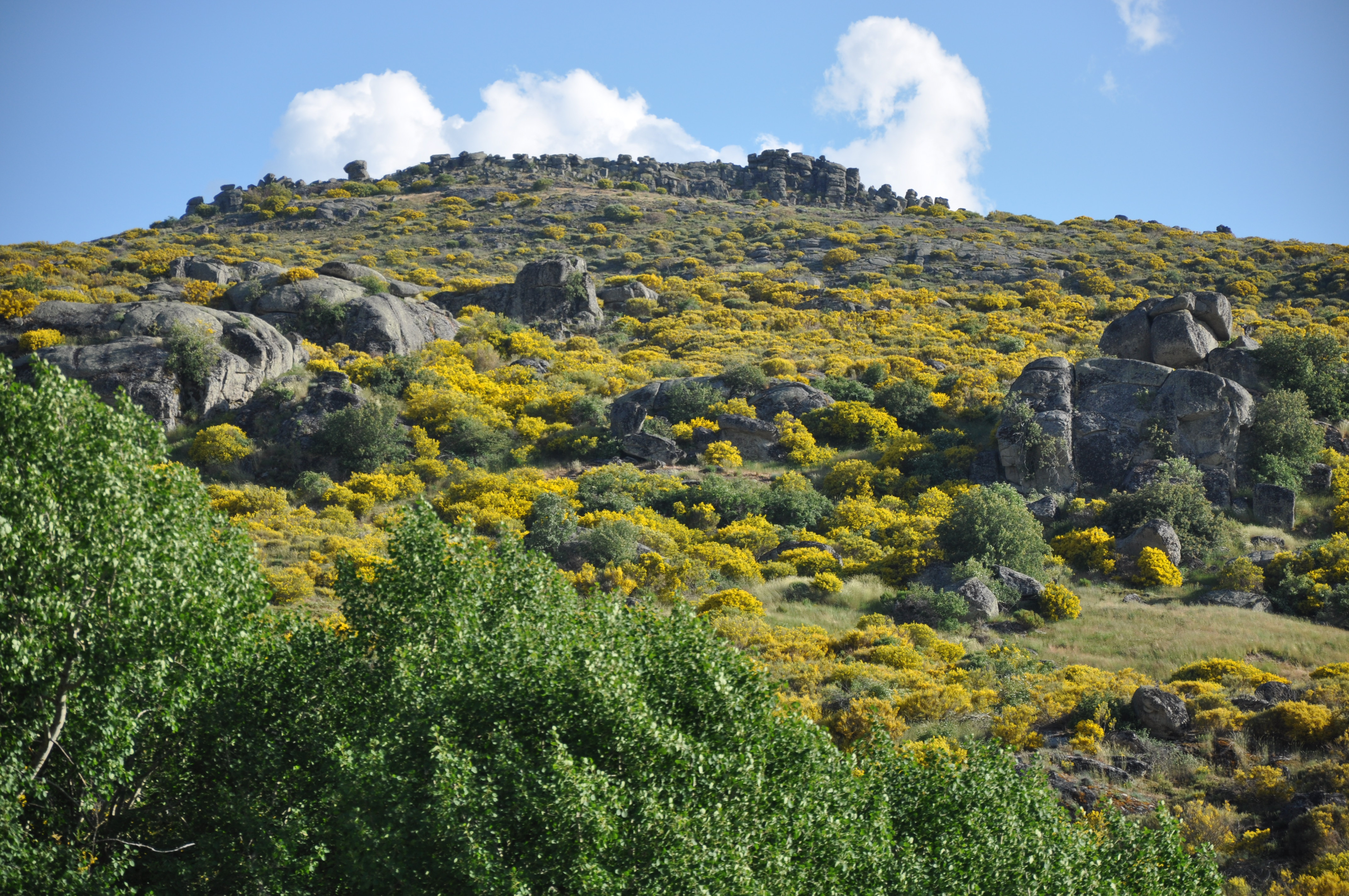 Matorral de hiniesta o ramos albares, en Alto de las Fuentes (1624 m), vertiente norte Sierra de Ávila, San Juan del Olmo, AV, España